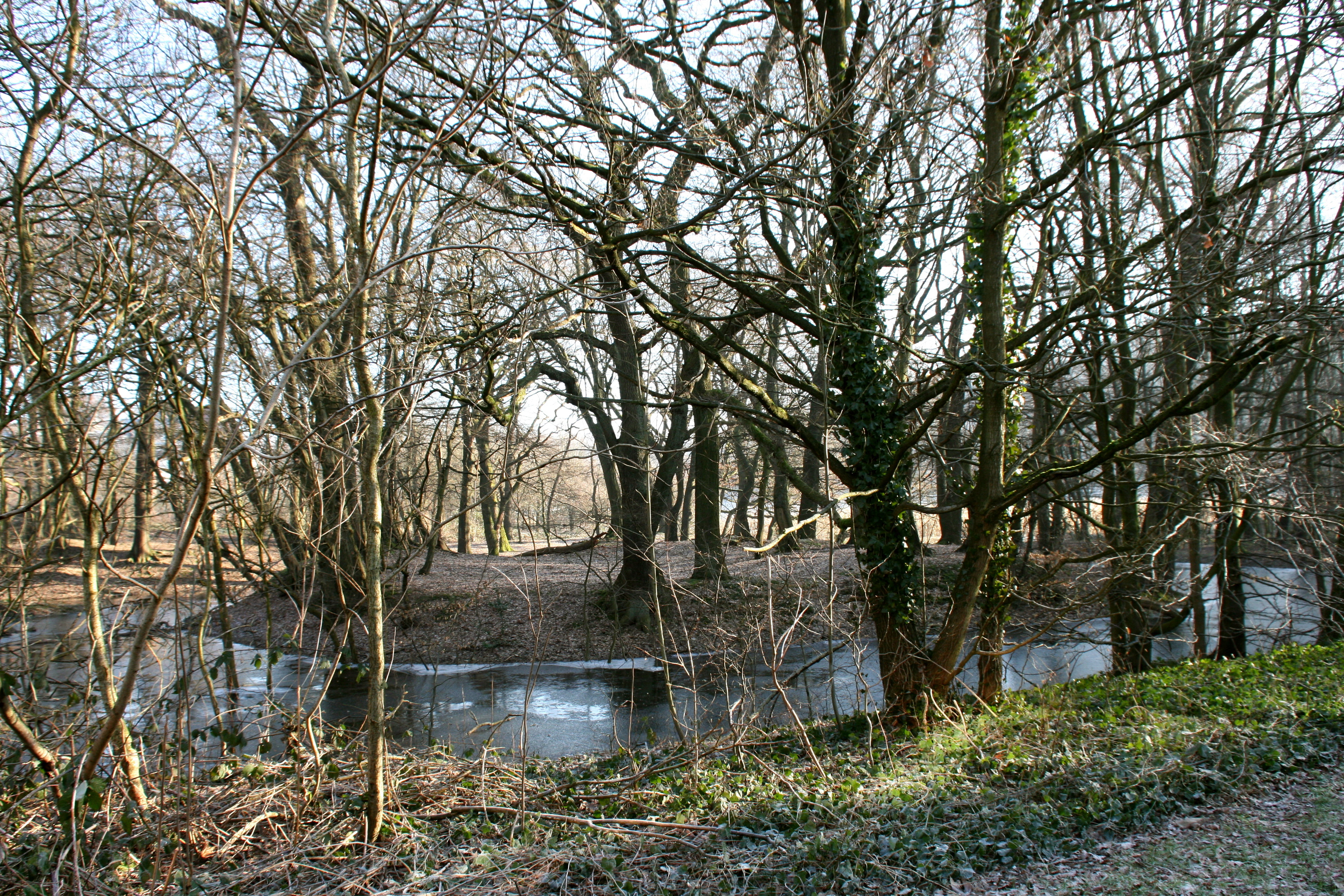 Haus Vittinghoff, Vittinghoffstraße in Essen